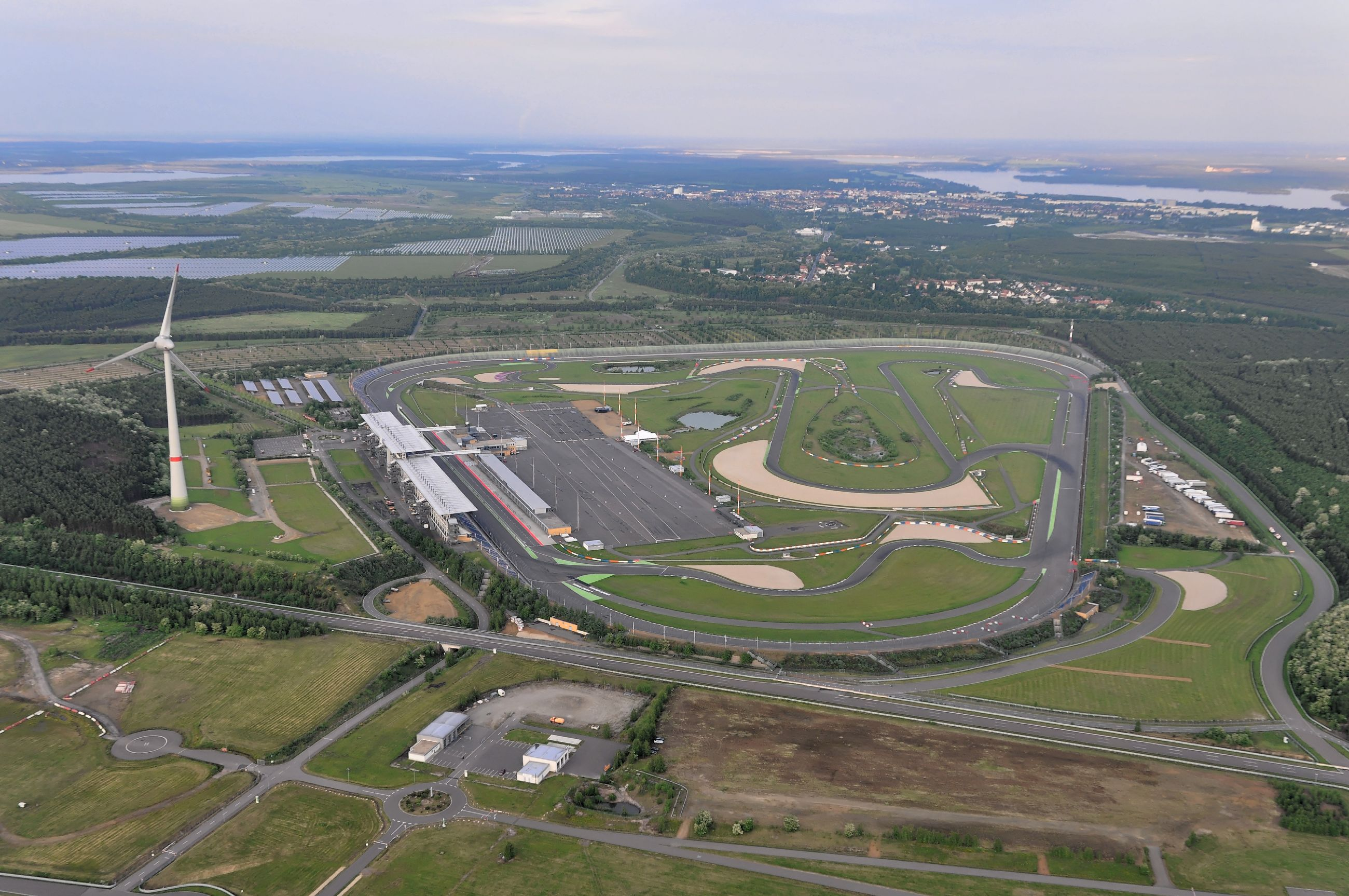 Bilder von den Lausitz Luftsport- & Techniktage 2013 am Flugplatz Schwarzheide-Schipkau